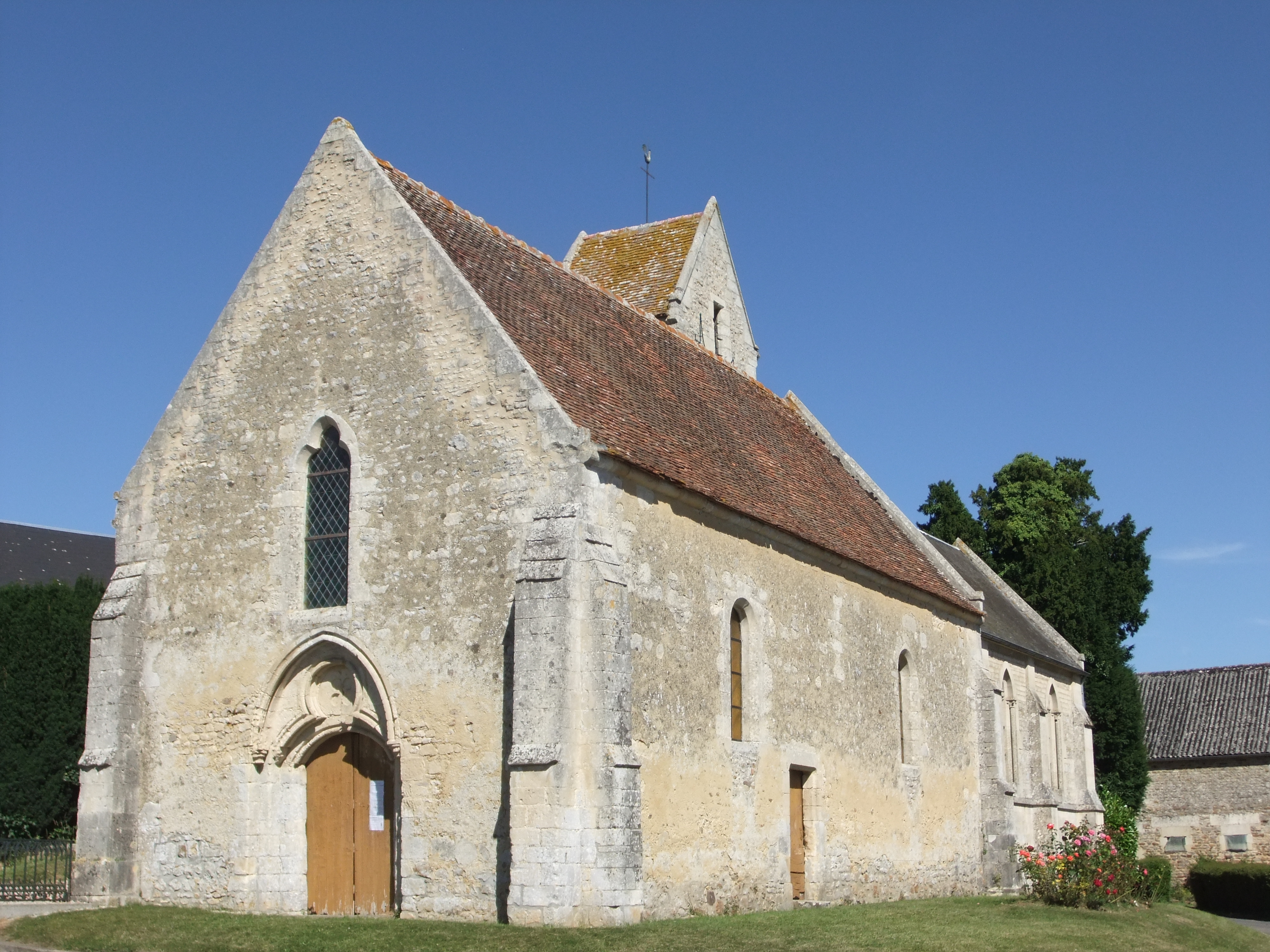 Eglise Saint-Aubin .